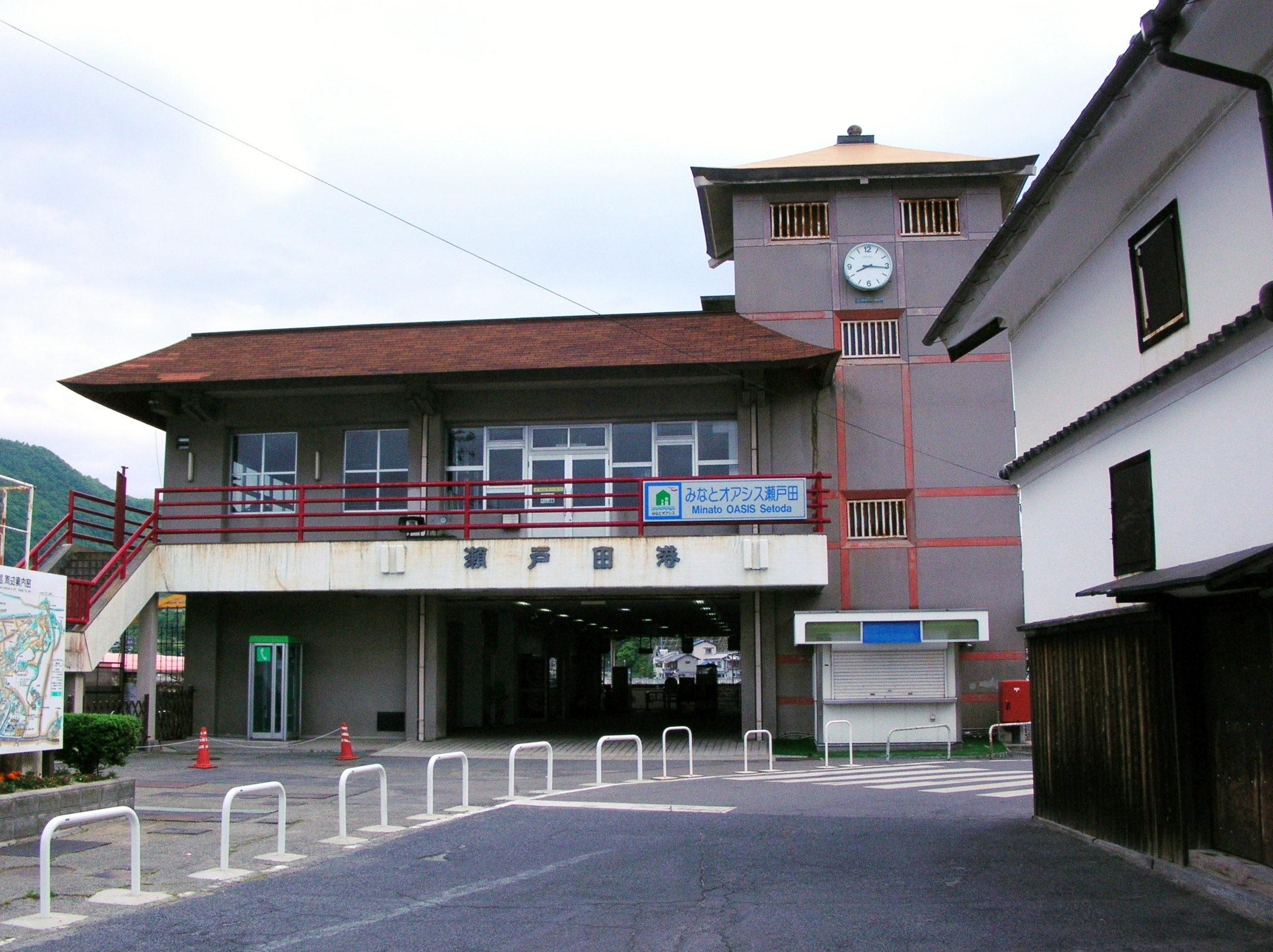 みなとオアシス瀬戸田